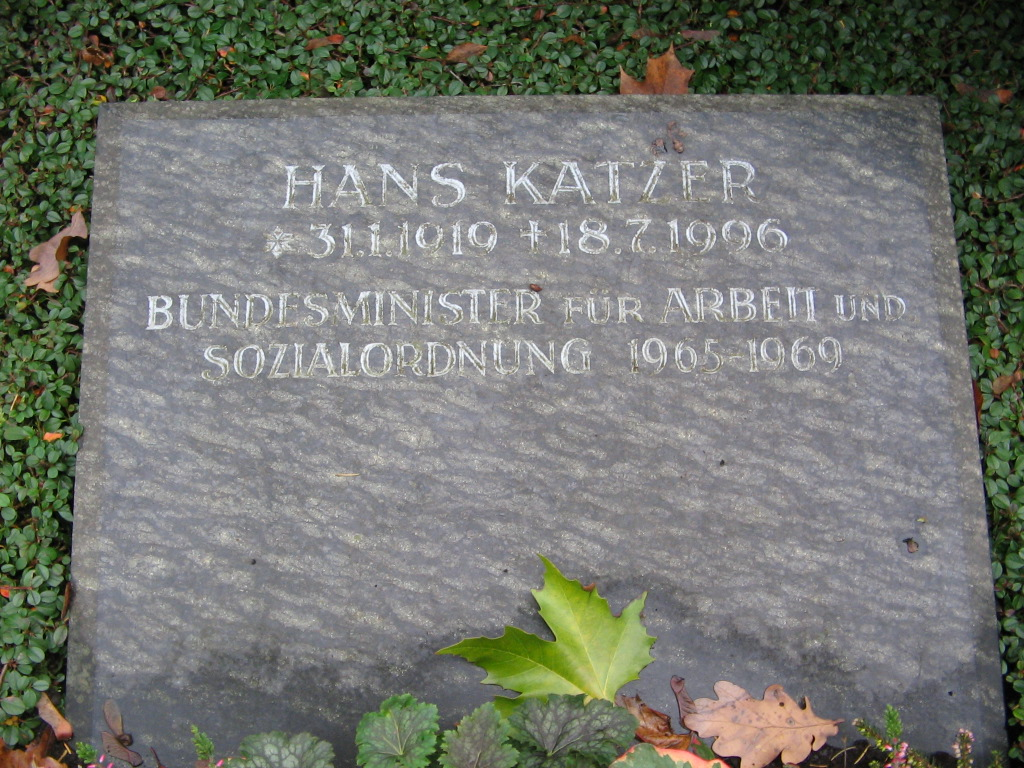 Grabstein von Hans Katzer (Politiker) auf dem Melaten-Friedhof in Köln